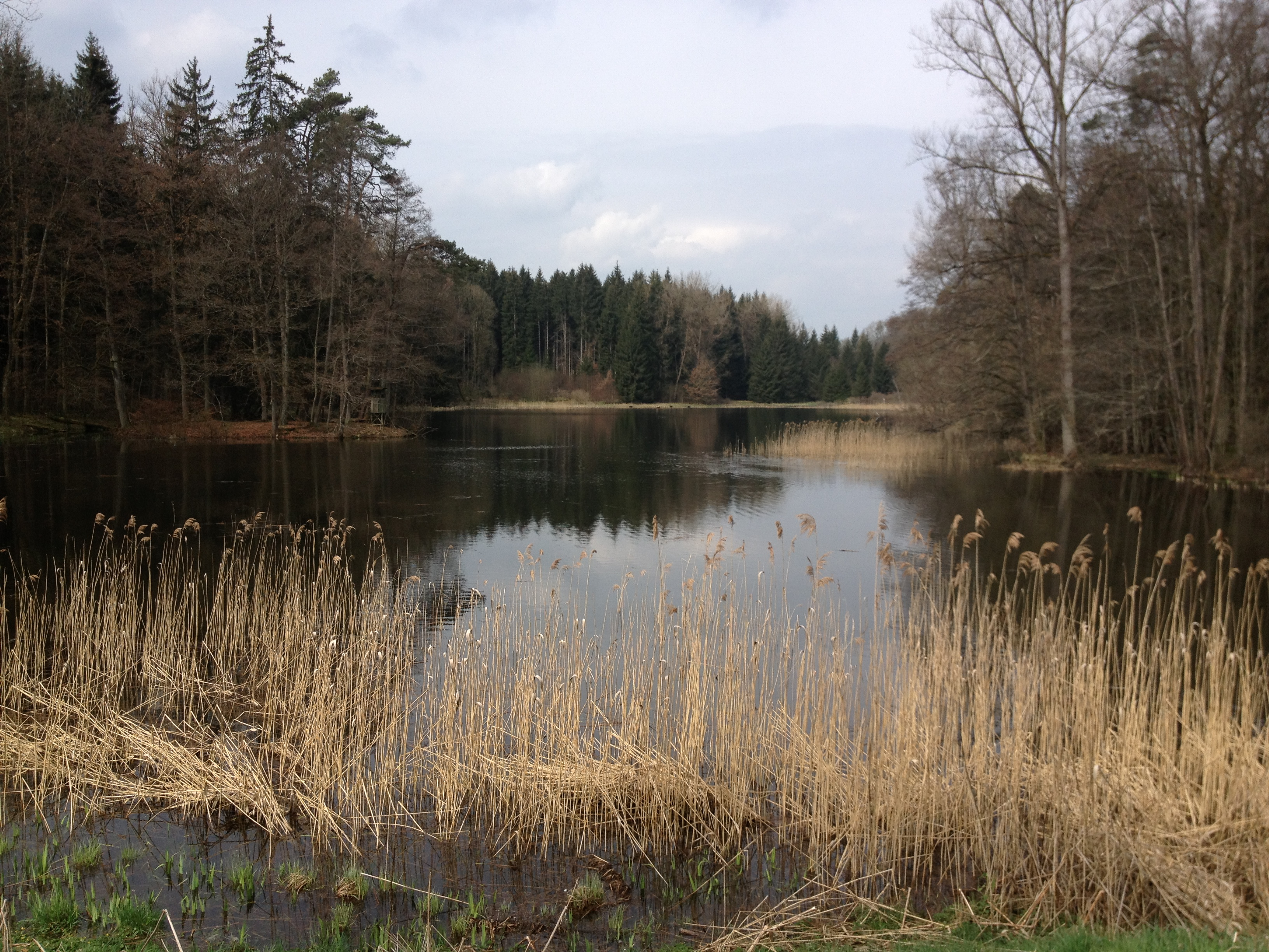 Wusthauer Weiher in Josefslust, Sigmaringen